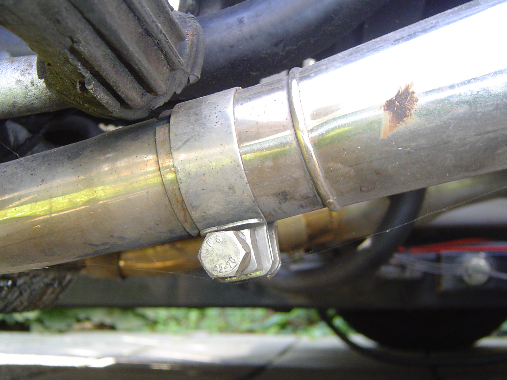 Een broekstuk is een deel van het uitlaatsysteem van een motorfiets of auto dat twee pijpen samenvoegt, bijvoorbeeld door het dempergedeelte over het bochtgedeelte te schuiven. Eigen werk. PD.